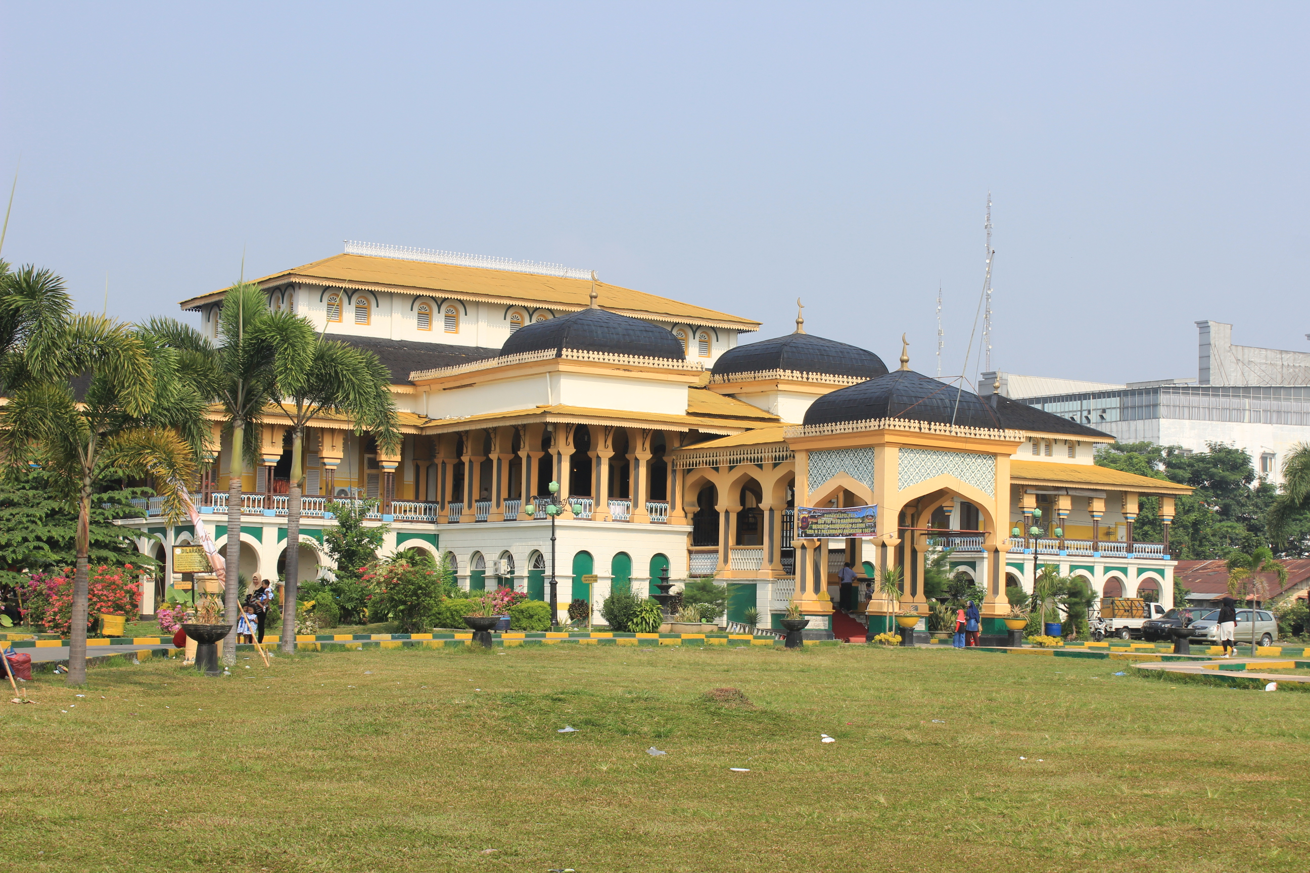 Maimun Palace, Medan